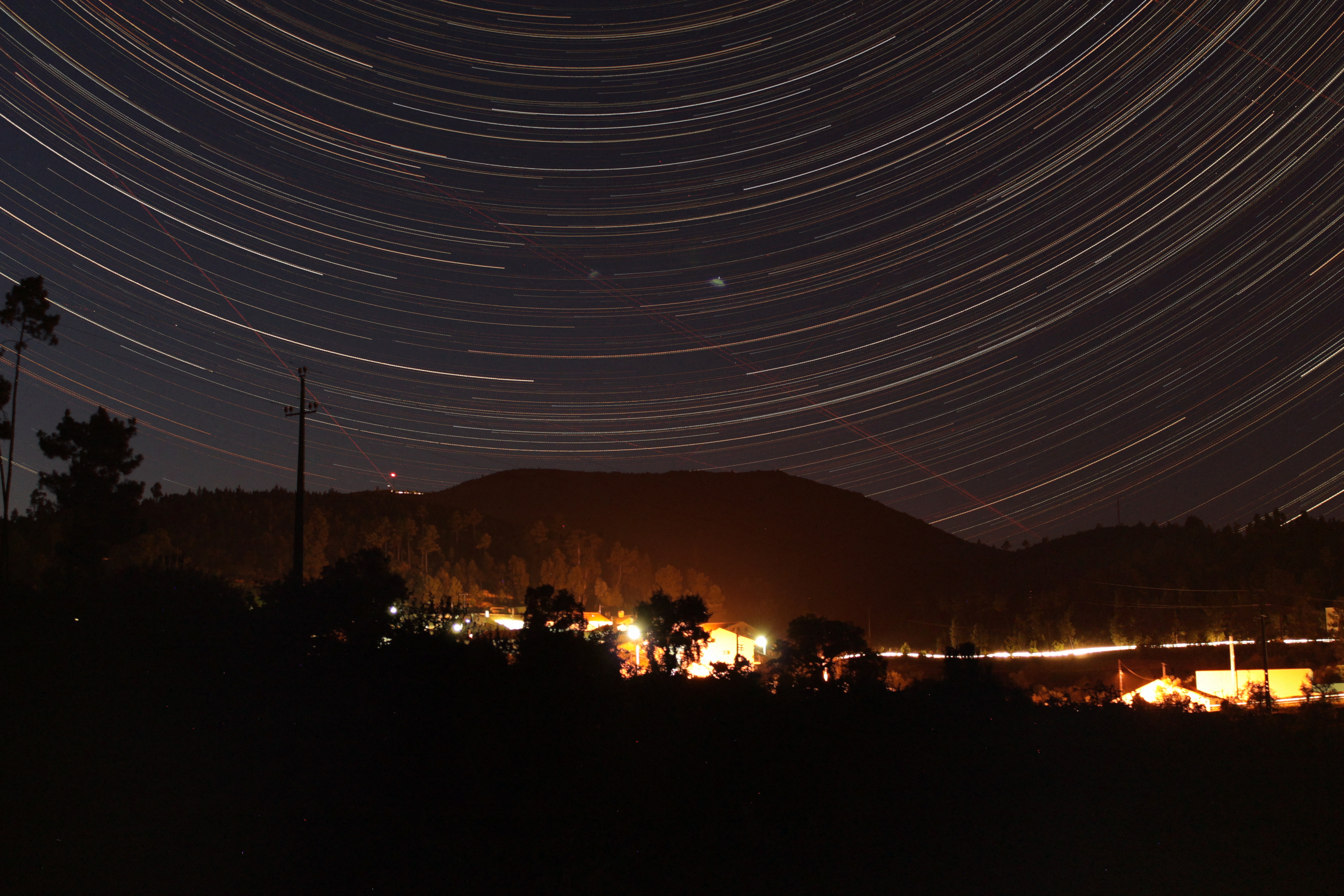 Sobreposição de fotografias, tiradas a partir do trilho da Horta da Fonte, que formam um rasto de estrelas sobre o Caratão.